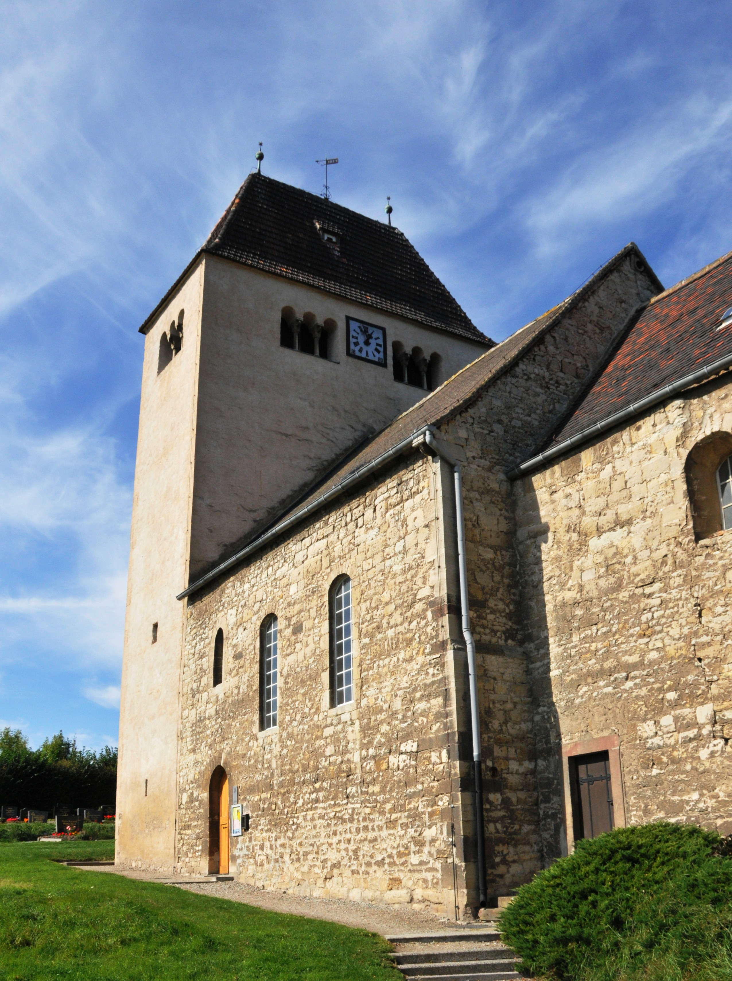 Mücheln, Michaelkirche